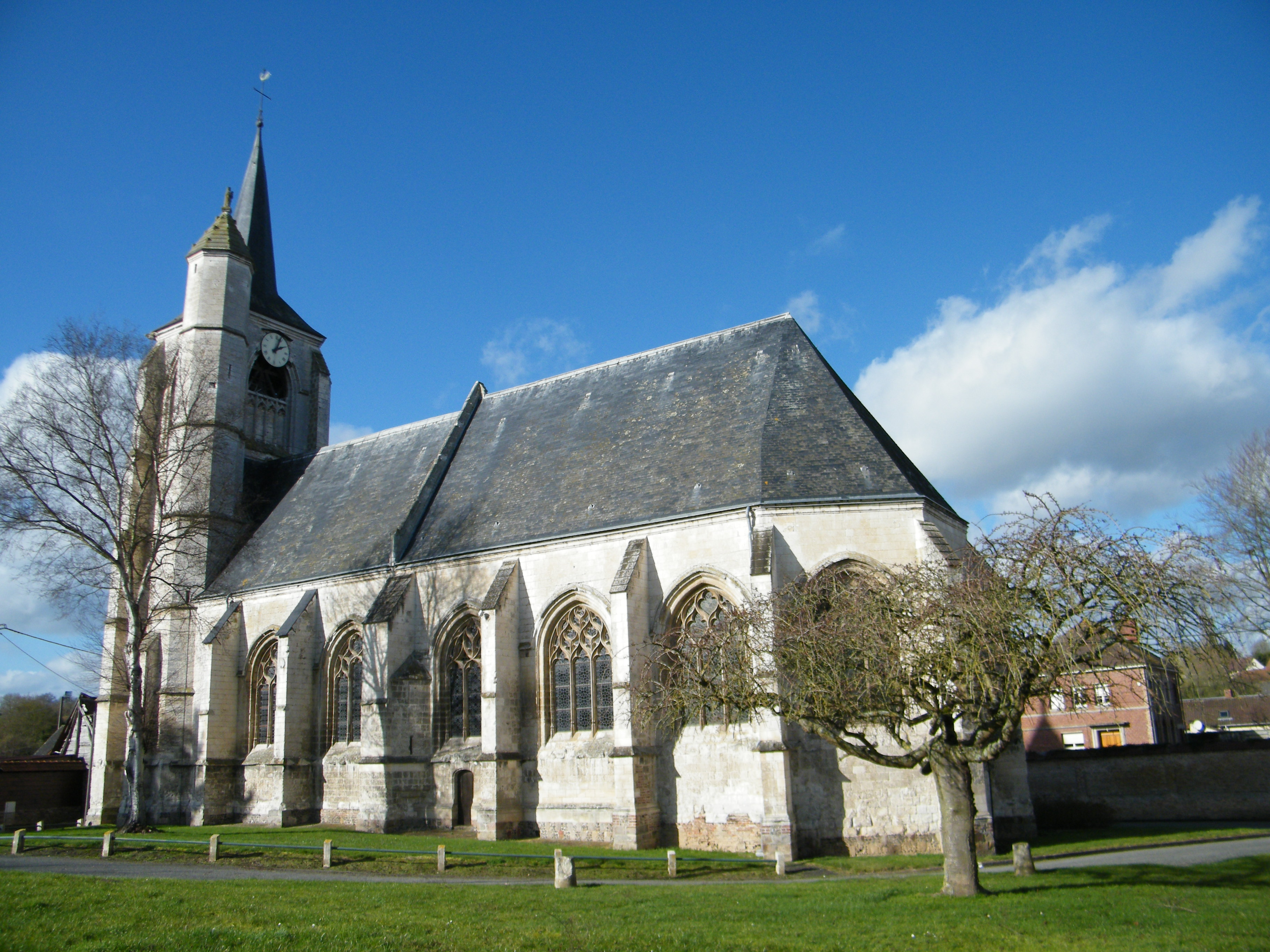 Allery, Somme, France, église